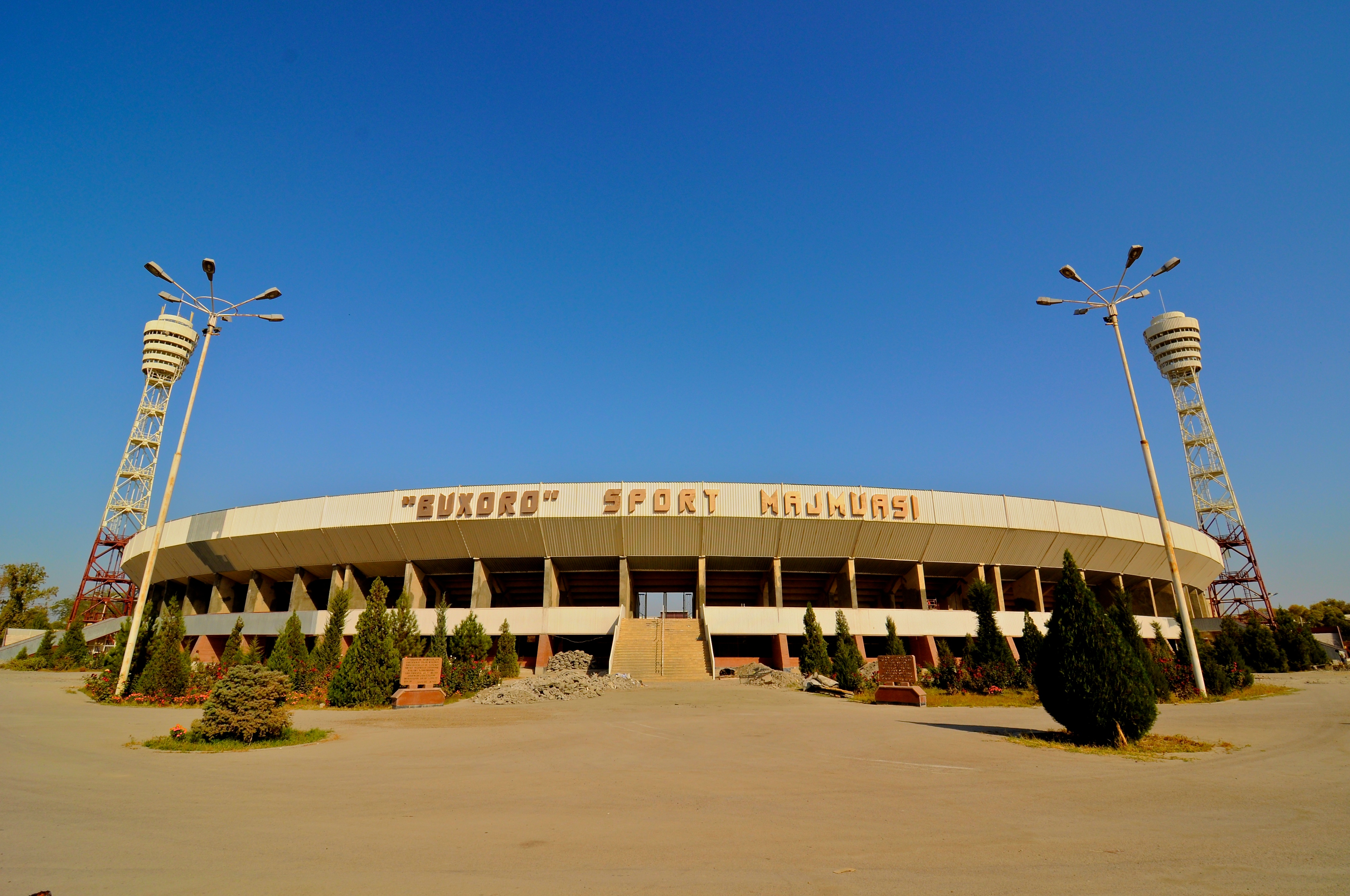 Uzbekistan, Bukhara, Football Stadium